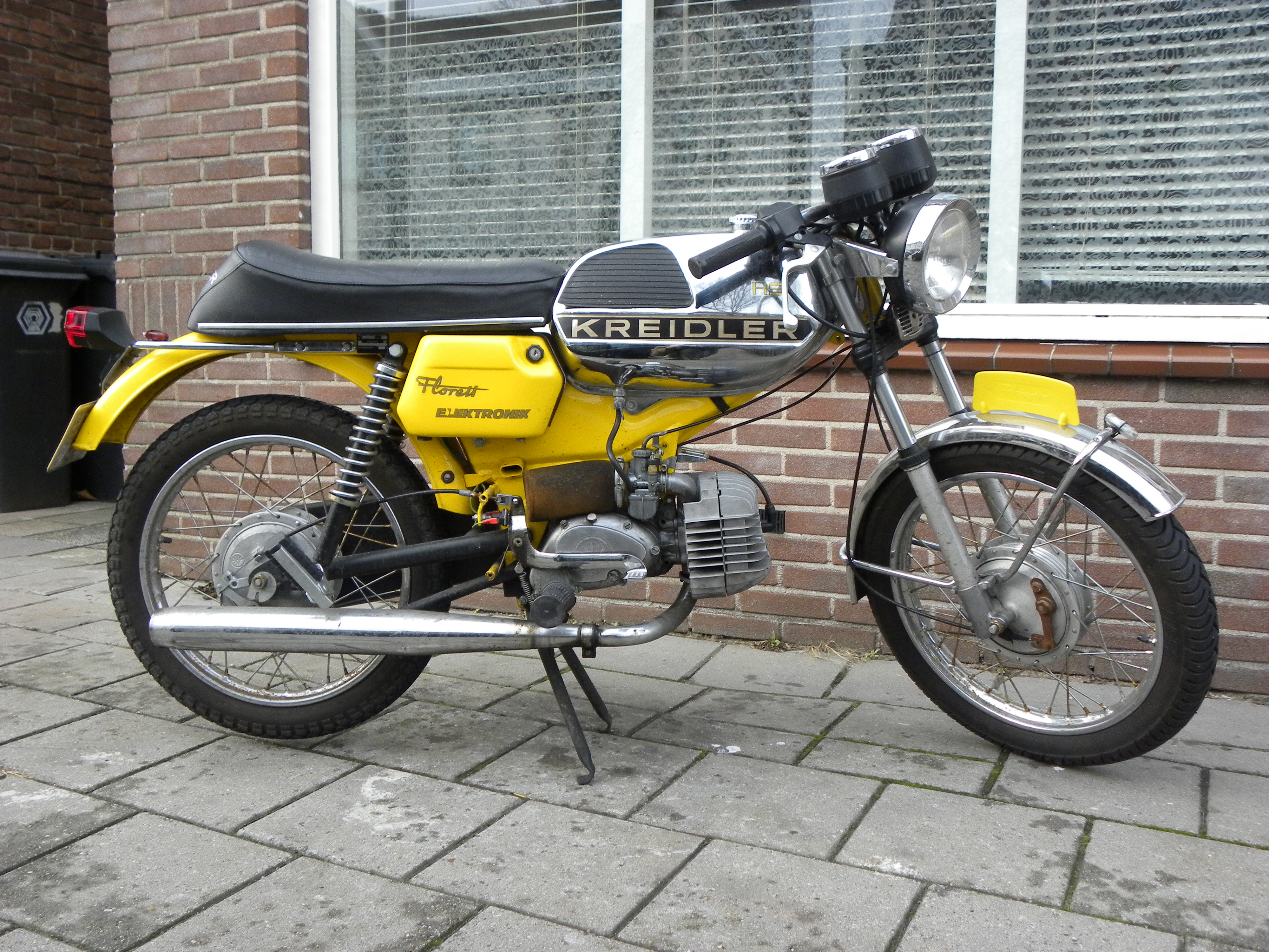 Kreidler Florett Rs Electronic